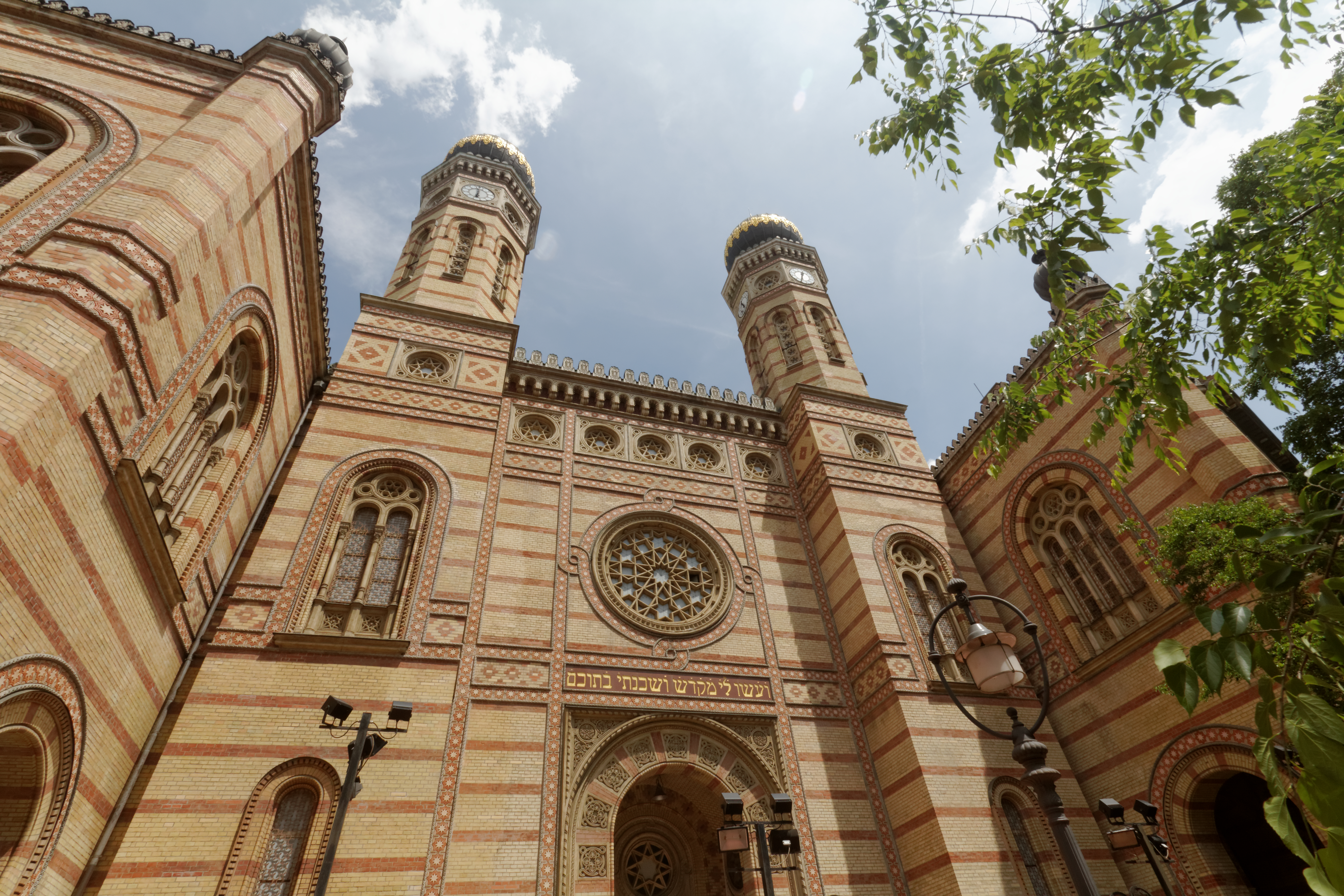 Budapest, Große Synagoge, Außenansicht